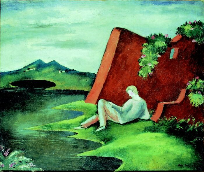 Idylla_-_krajobraz_z_lezecym_młodziencem